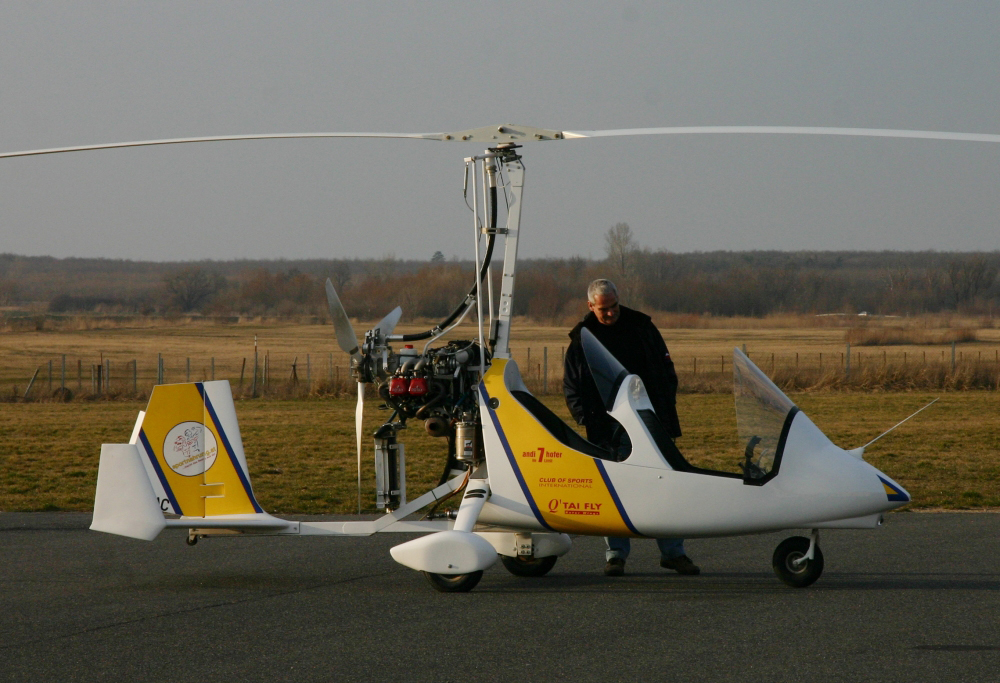 Gyrocopter a fertőszentmiklósi repülőtéren